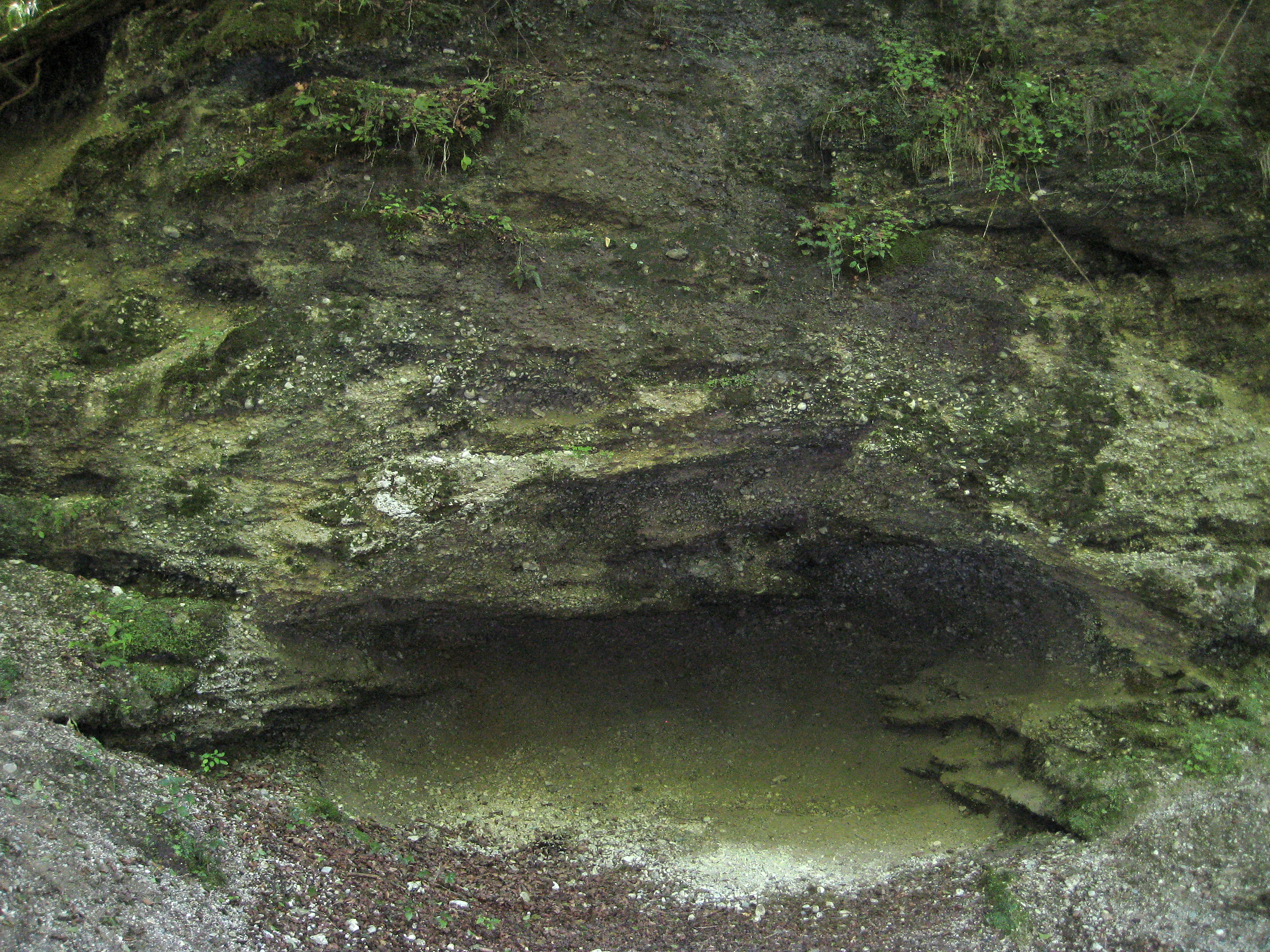 Nagelfluhaufschlüsse in der Maisinger Schlucht